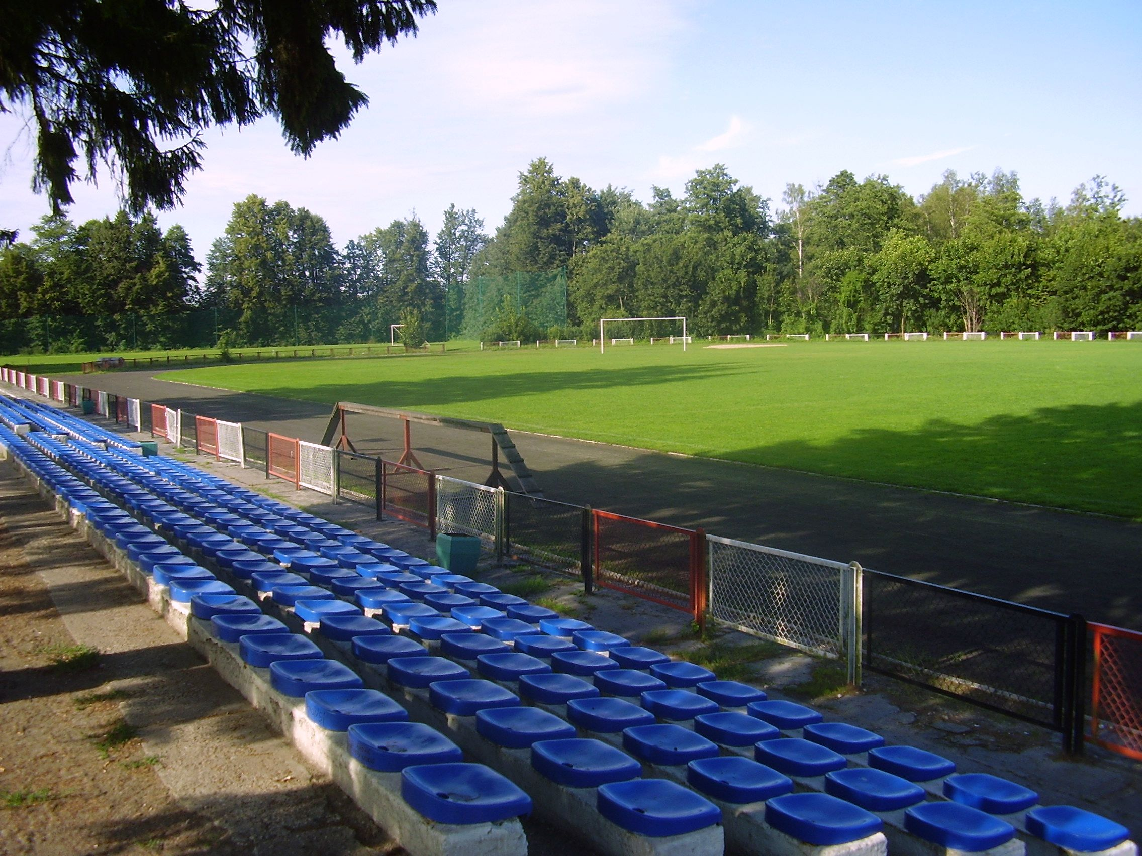 Płyta główna stadionu w Morągu